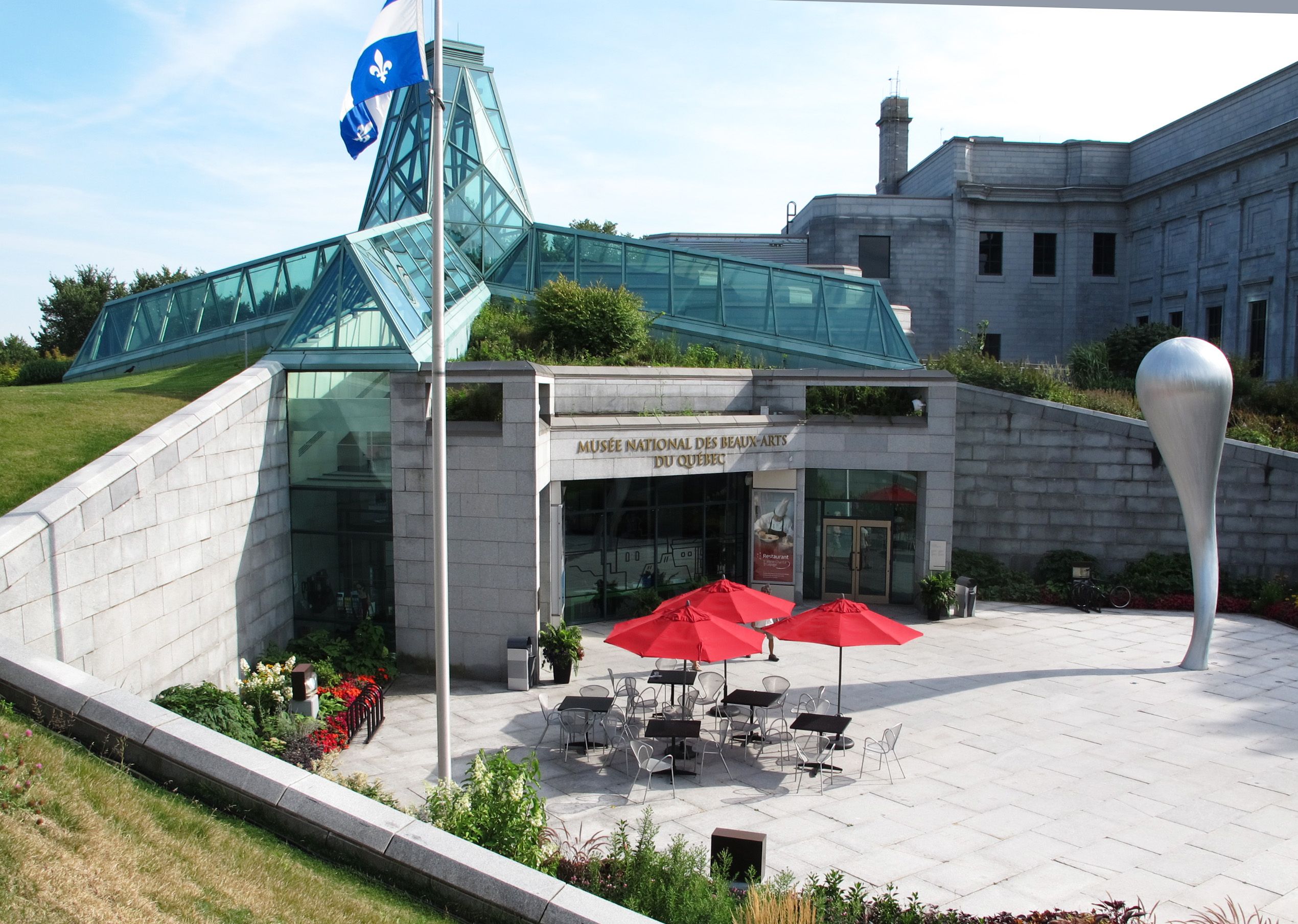 Musée national des beaux-arts du Québec, pavillon central, Québec. À droite, « Trombe », sculpture de Jean-Pierre Morin.